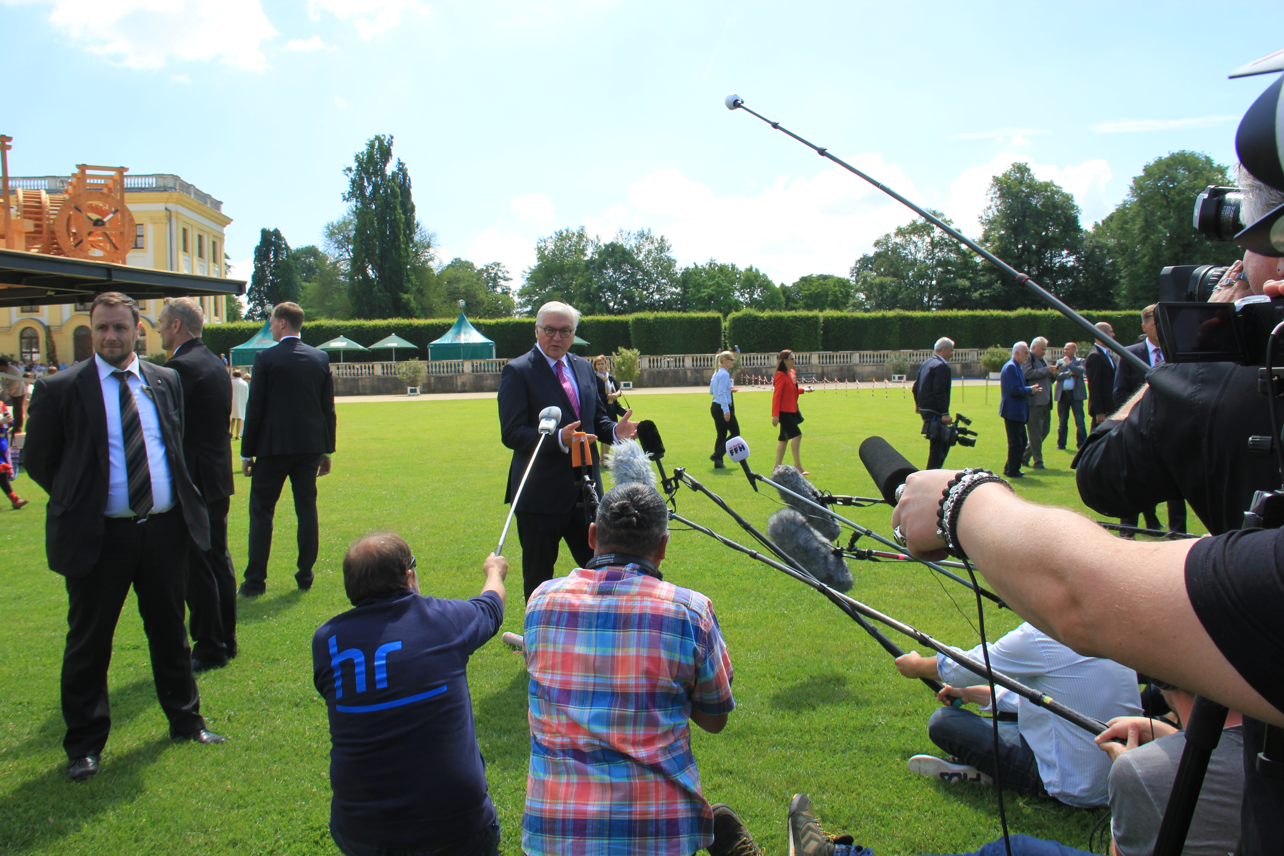 Bundespräsident Frank Walter Steinmeier bei seiner Rede zur Eröffnung der Documenta 14 in Kassel umzingelt von Journalisten und Fotografen